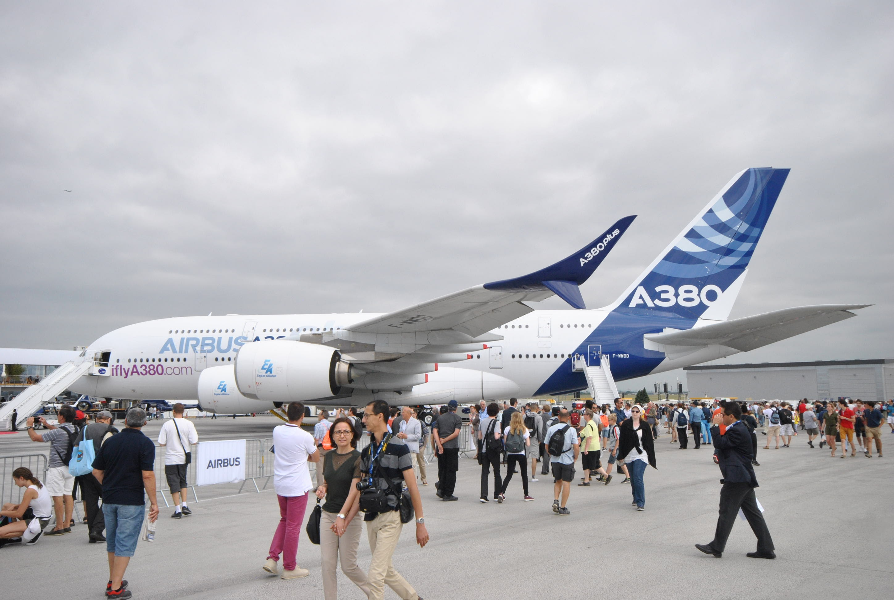 Paris Air Show 2017 Airbus A380plus